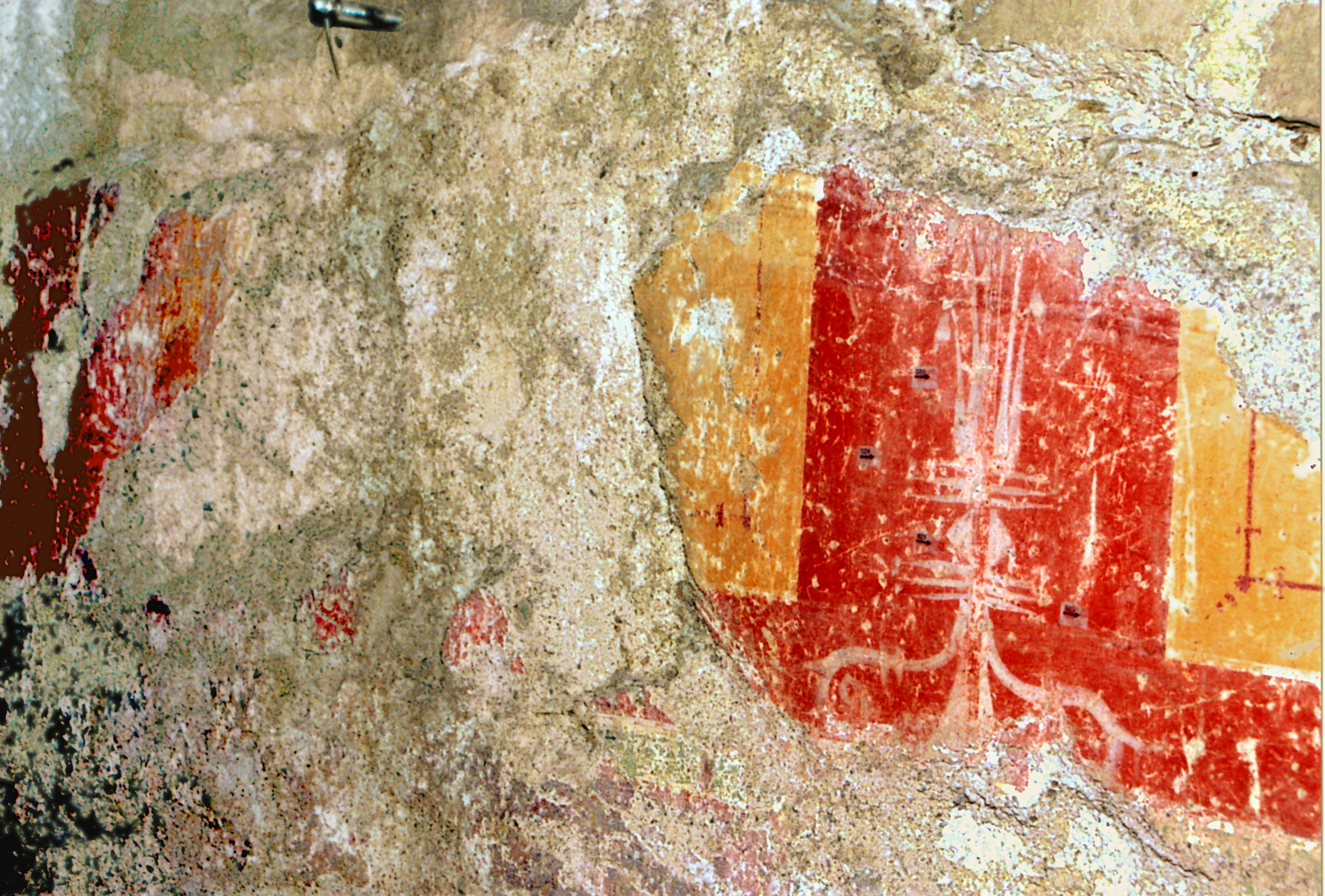 Reste der Wandmalerreien mit Schirmkandelabern am Ostende des Korridors aus der Zeit von Haus II.